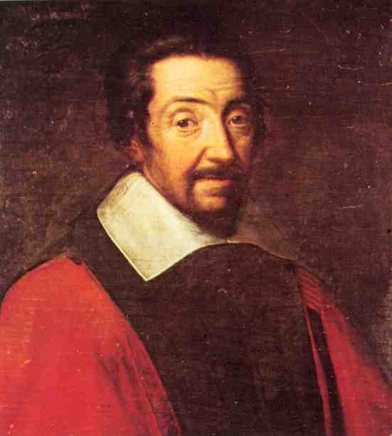 Pierre Broussel (1575-1654), Conseiller au Parlement de Paris, devient populaire pendant la Fronde parlementaire en s'opposant aux nouvelles taxes proposées par Mazarin. French politician under Louis XIV